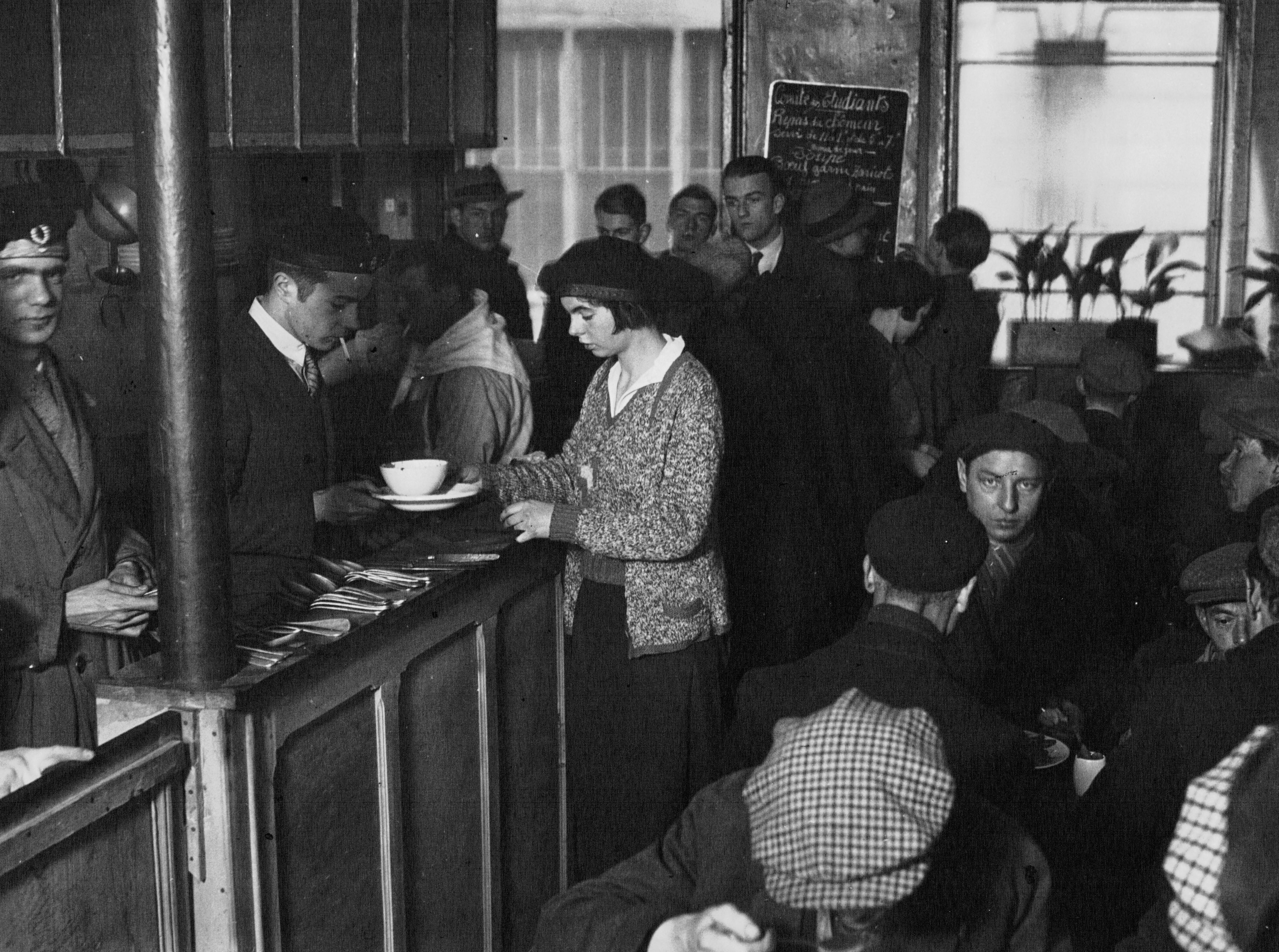 Soupe populaire de la faluche en 1932.